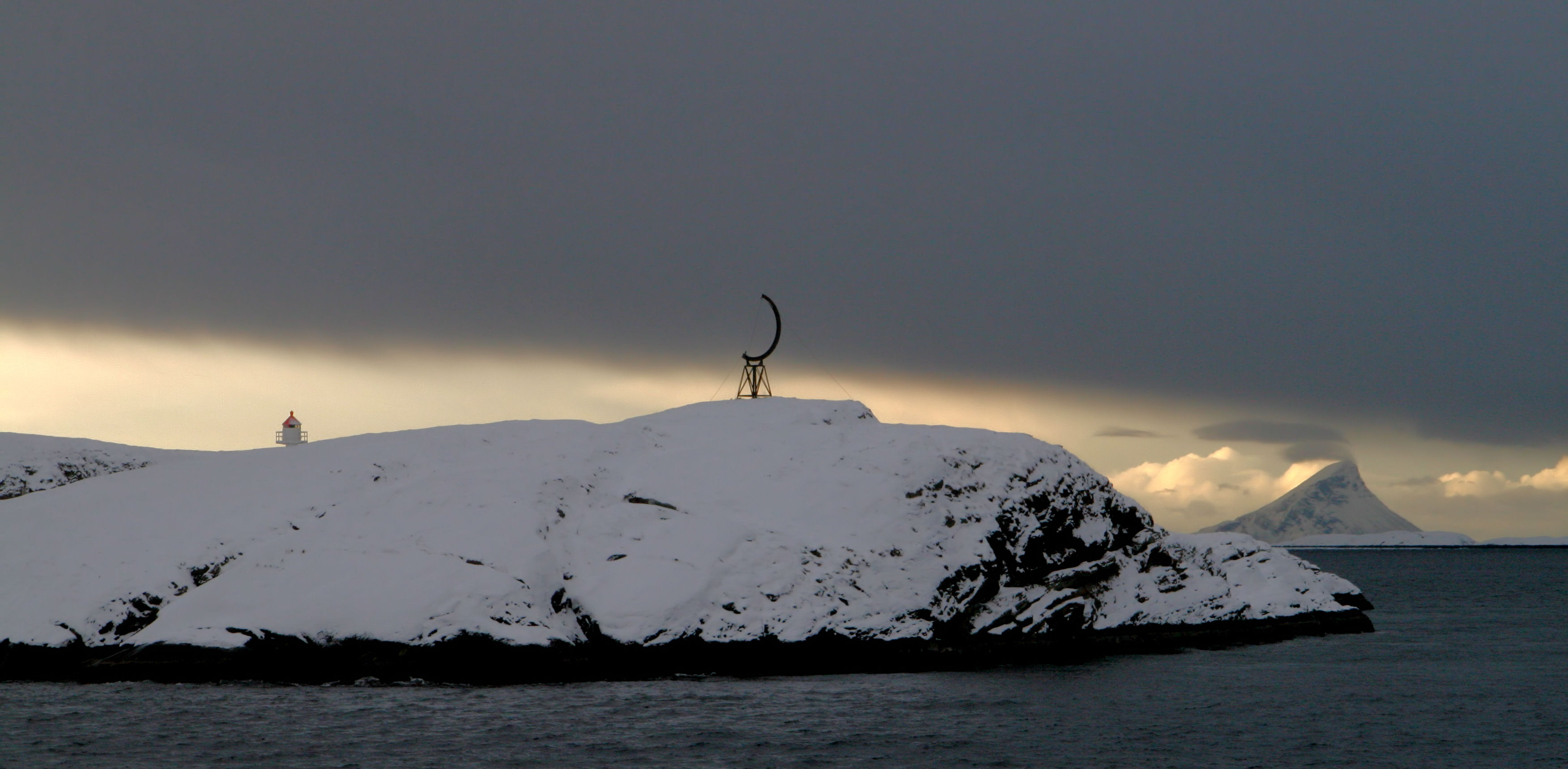 Eind februari 2006 gefotografeerd tijdens een reis met M/S Nordstjernen, het oudste schip dat tijdens deze winter actief was op Hurtigruten